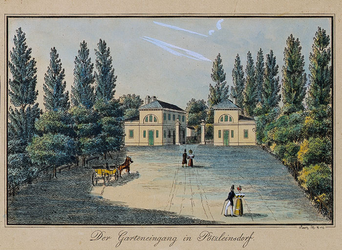 Wien, Vorstädte